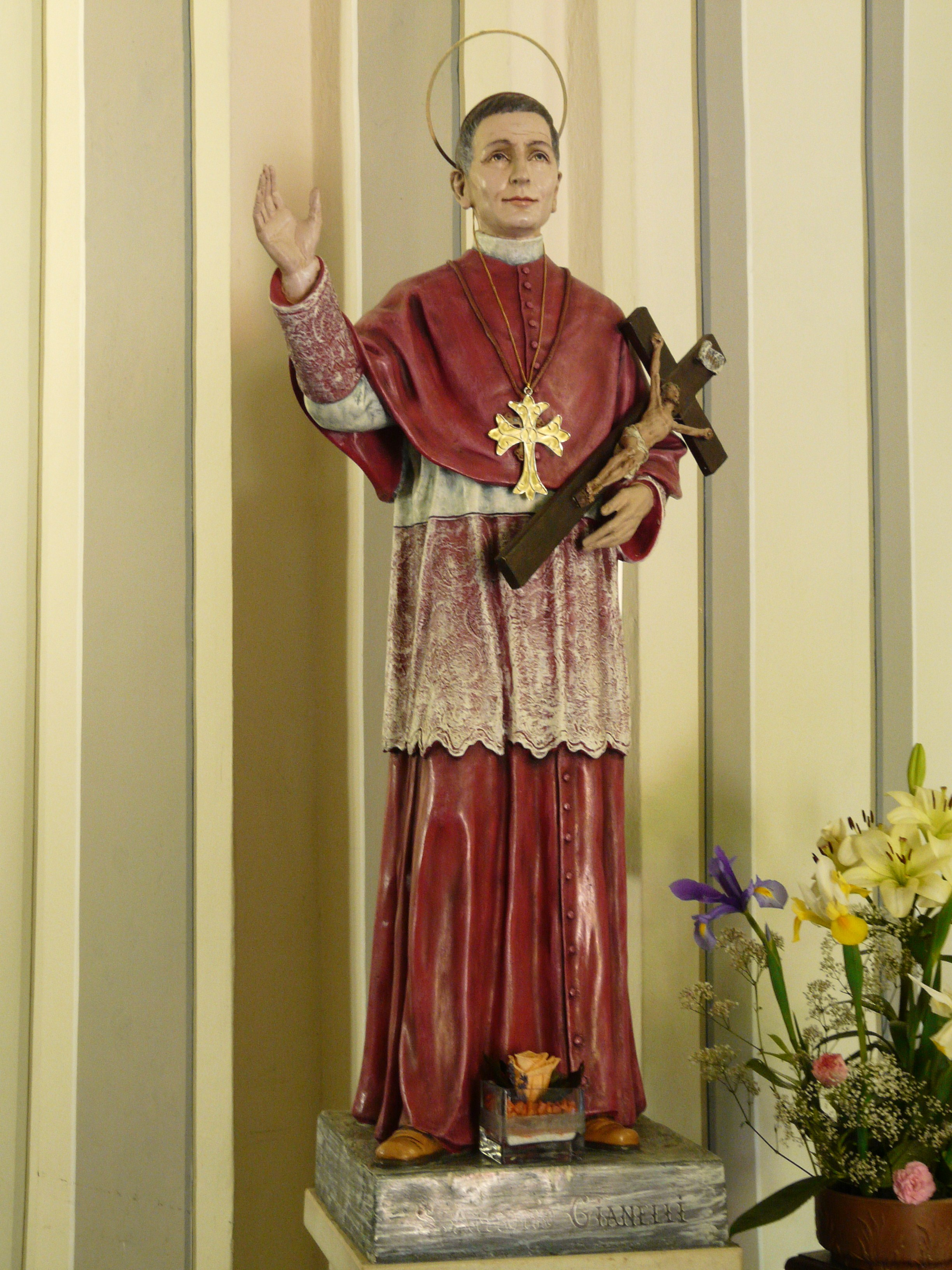 Statua del santo Antonio Maria Gianelli del santuario di Cerreta, Carro, Liguria, Italia